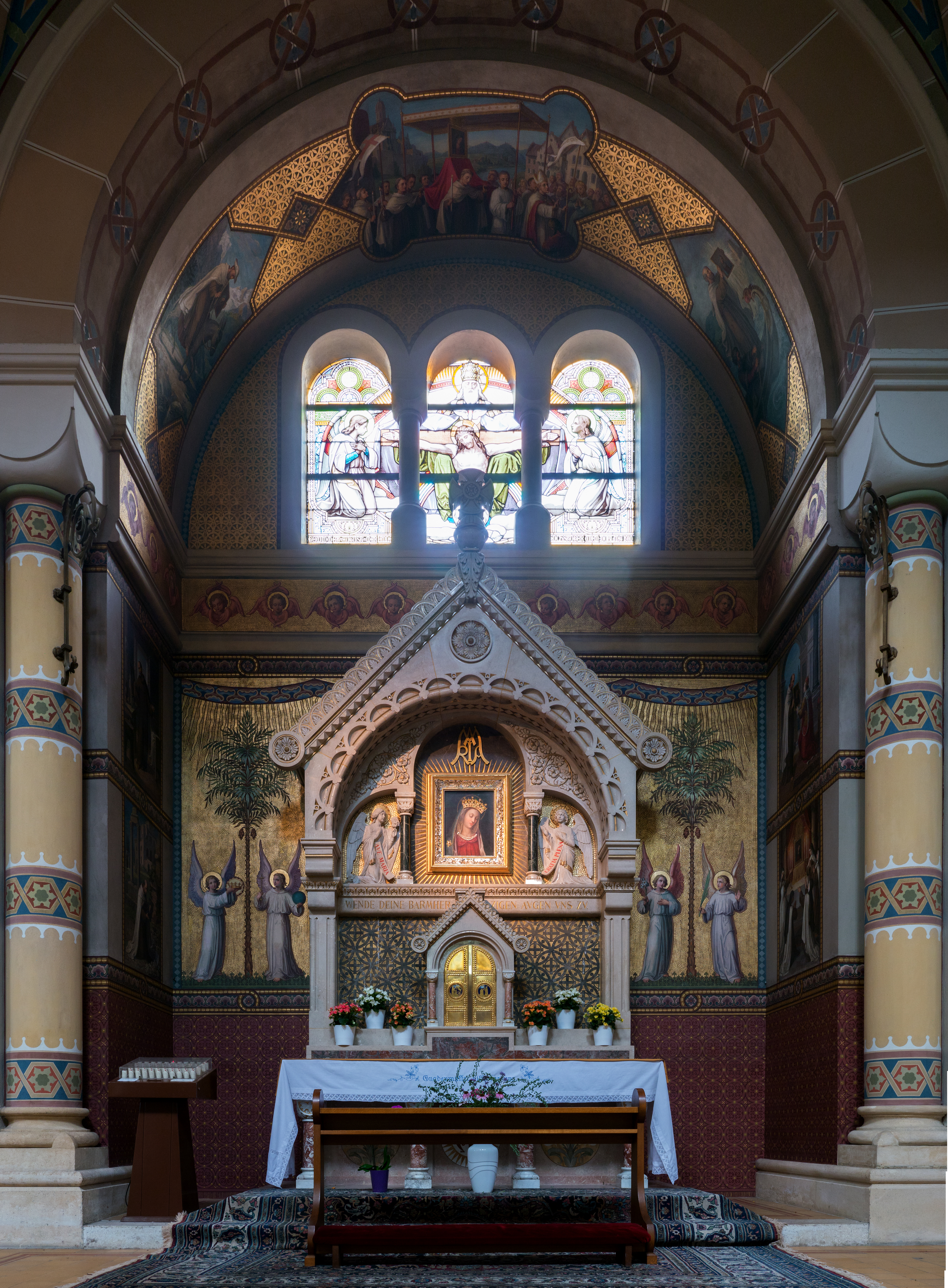 Karmeliterkloster mit Kirche Hl. Familie und Pfeilerbildstock vor der Kirche; Seitenaltar Maria mit dem Geneigten Haupt